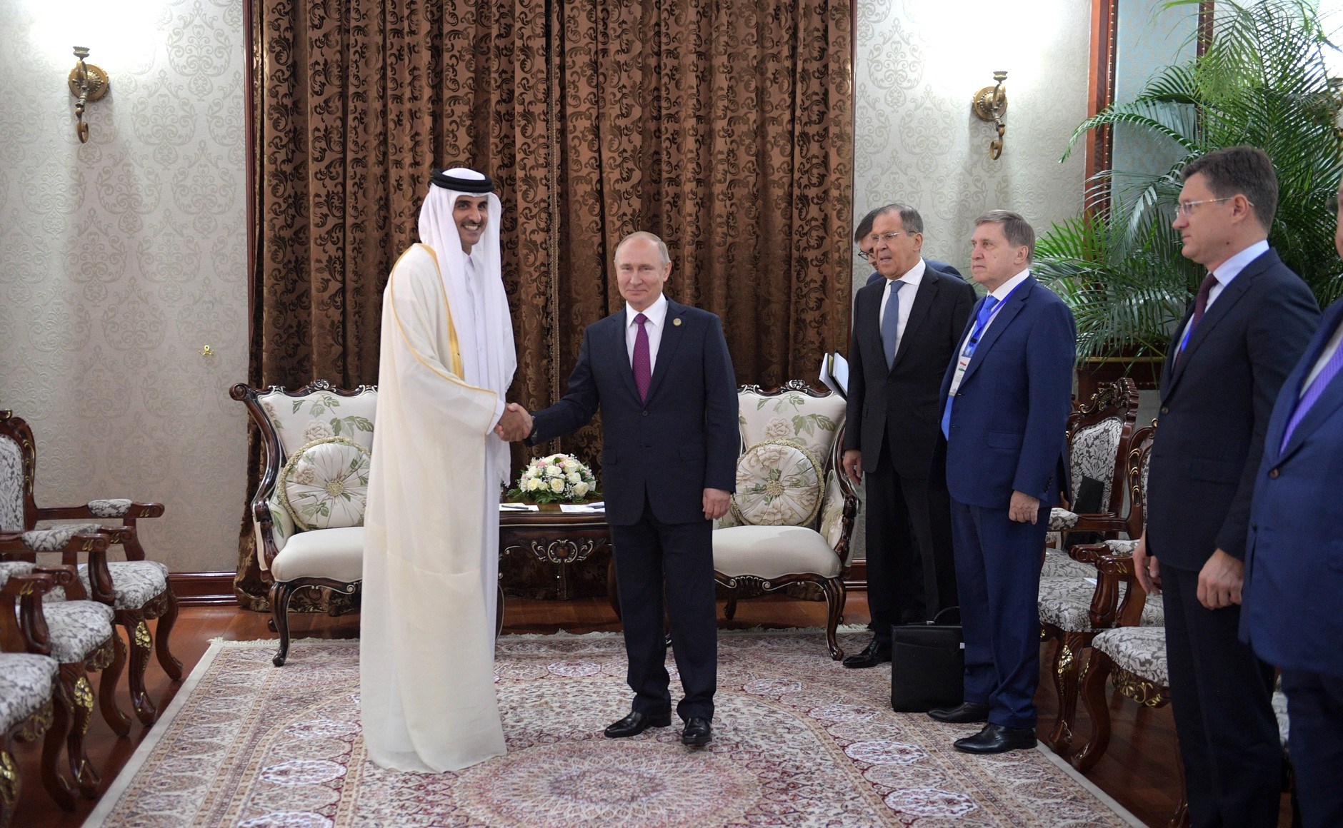 Встреча Президента России Владимира Путина с Эмиром Государства Катар Тамимом Бен Хамадом Аль Тани